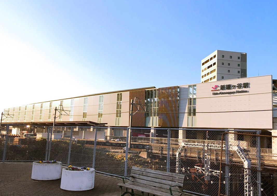 新鎌ヶ谷駅新駅舎